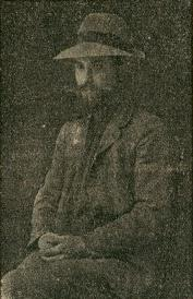 Александър Антонов